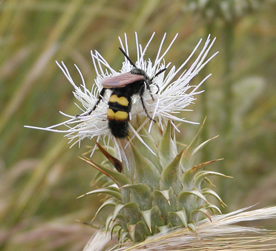 Eine Wespe